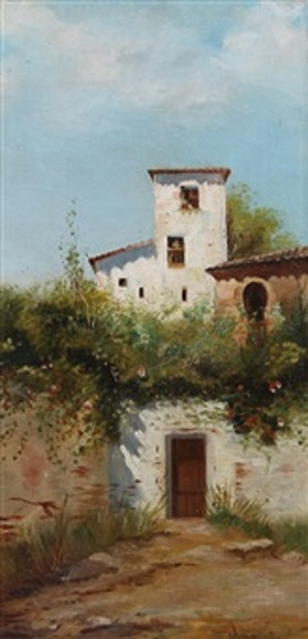 "Casolare di campagna", olio su tela, 59.5 x 29.5 cm.